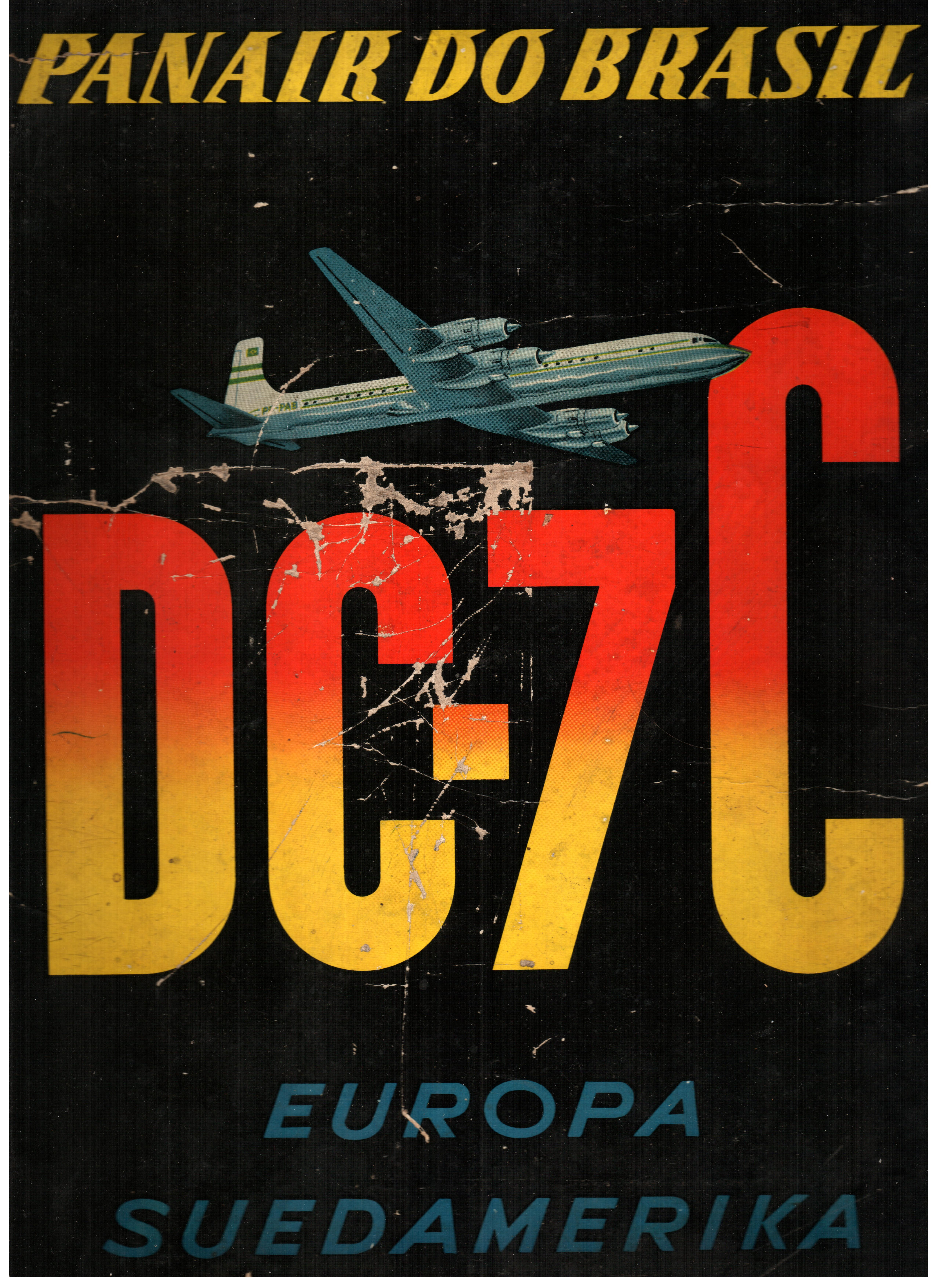 A színes, karton reklám lapot 2012. július 10 -én szkenneltem. A Panair do Brazil légitársaság (Brazilia) 1955 -ben vásárolt 4 Douglas DC-7C repülőgépet, ami abban az időben ideális volt a nagy távolságú repülésre. Published under Creative Commons in the Metapolisz DVD line. All of the photos and vids in the Metapolisz DVD line are under Creative Commons and can be used even for commercial – for profit – purposes. Recommended Citation Derzsi Elekes Andor: Metapolisz DVD line Megjelent Creative Commons alatt a Metapolisz sorozatban. A Metapolisz sorozat valamennyi képe és filmje Creative Commons alatti valamint kereskedelmi - for profit - célra is felhasználható. Ajánlott hivatkozás: Derzsi Elekes Andor: Metapolisz DVD line